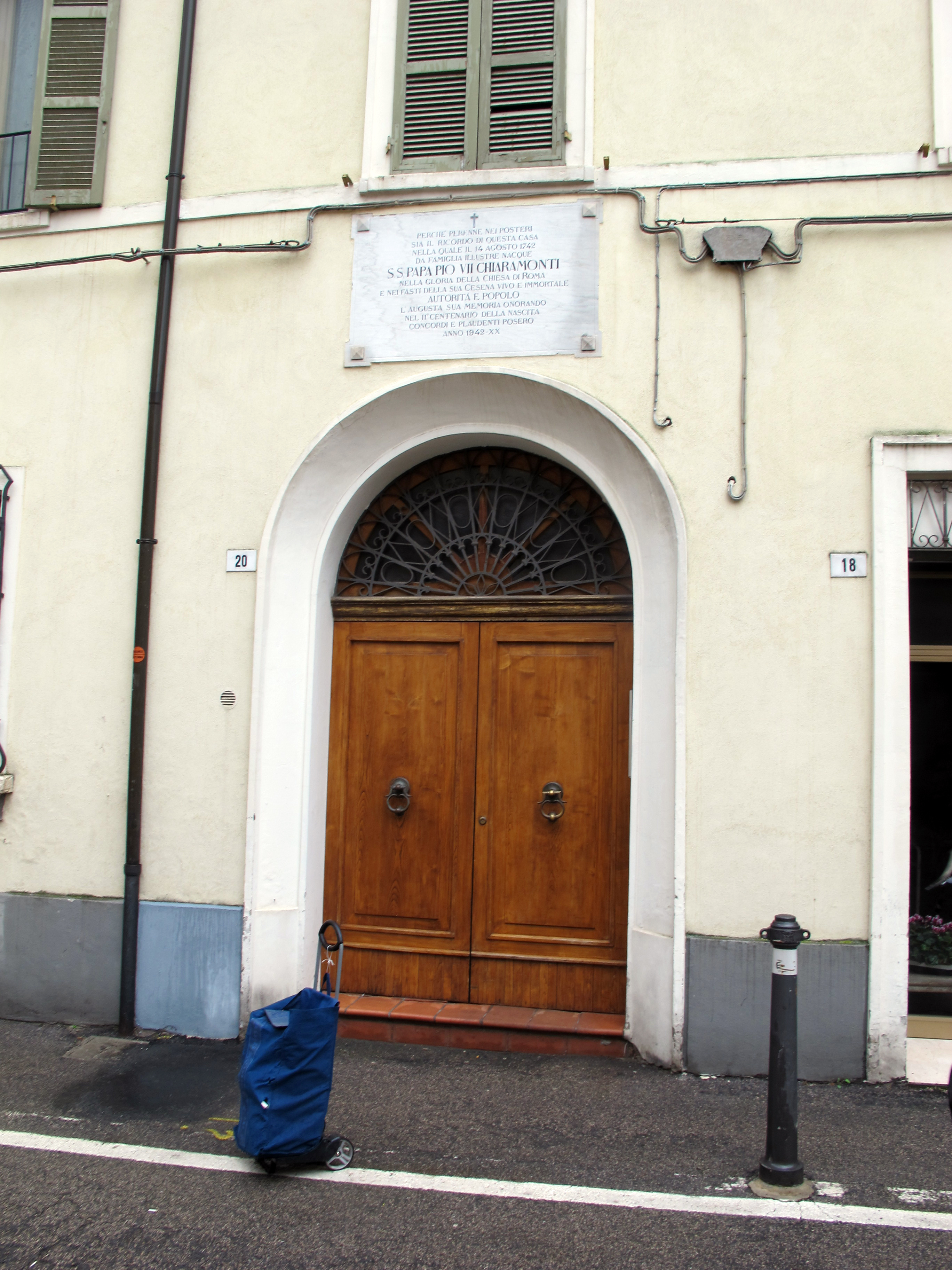 Cesena